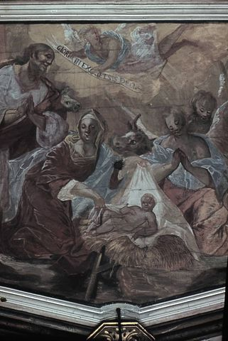 Gemälde von Johann Martin Seekatz, Dreifaltigkeitskirche Worms